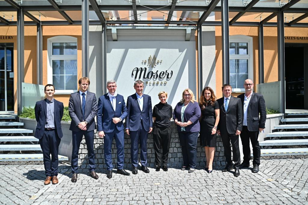 Se zástupci vlády ČR